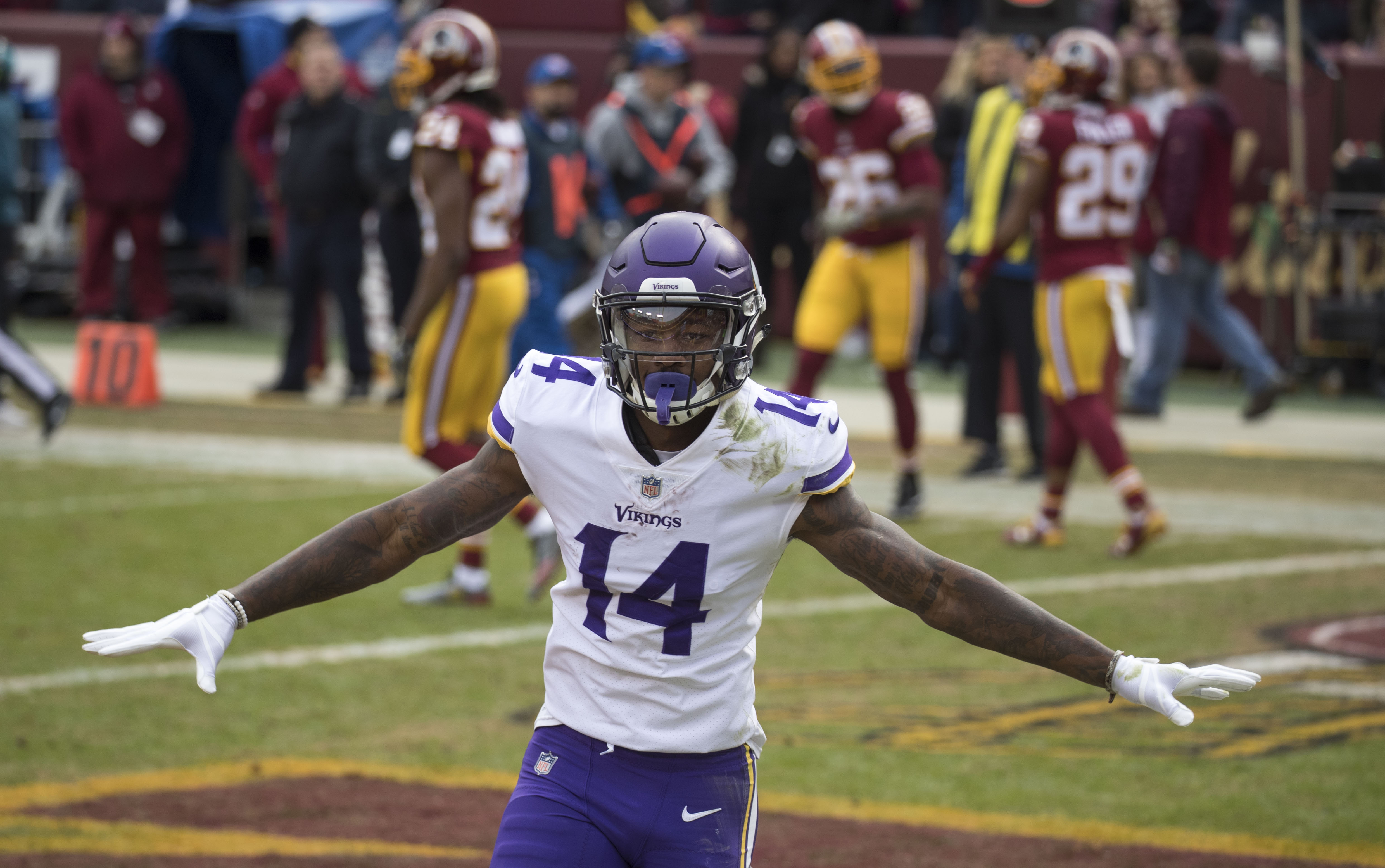 Vikings at Redskins 11/12/17